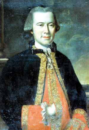 Portrait de Louis Aleno de Saint-Aloüarn (1738-1772), officier de marine et explorateur français. Auteur inconnu